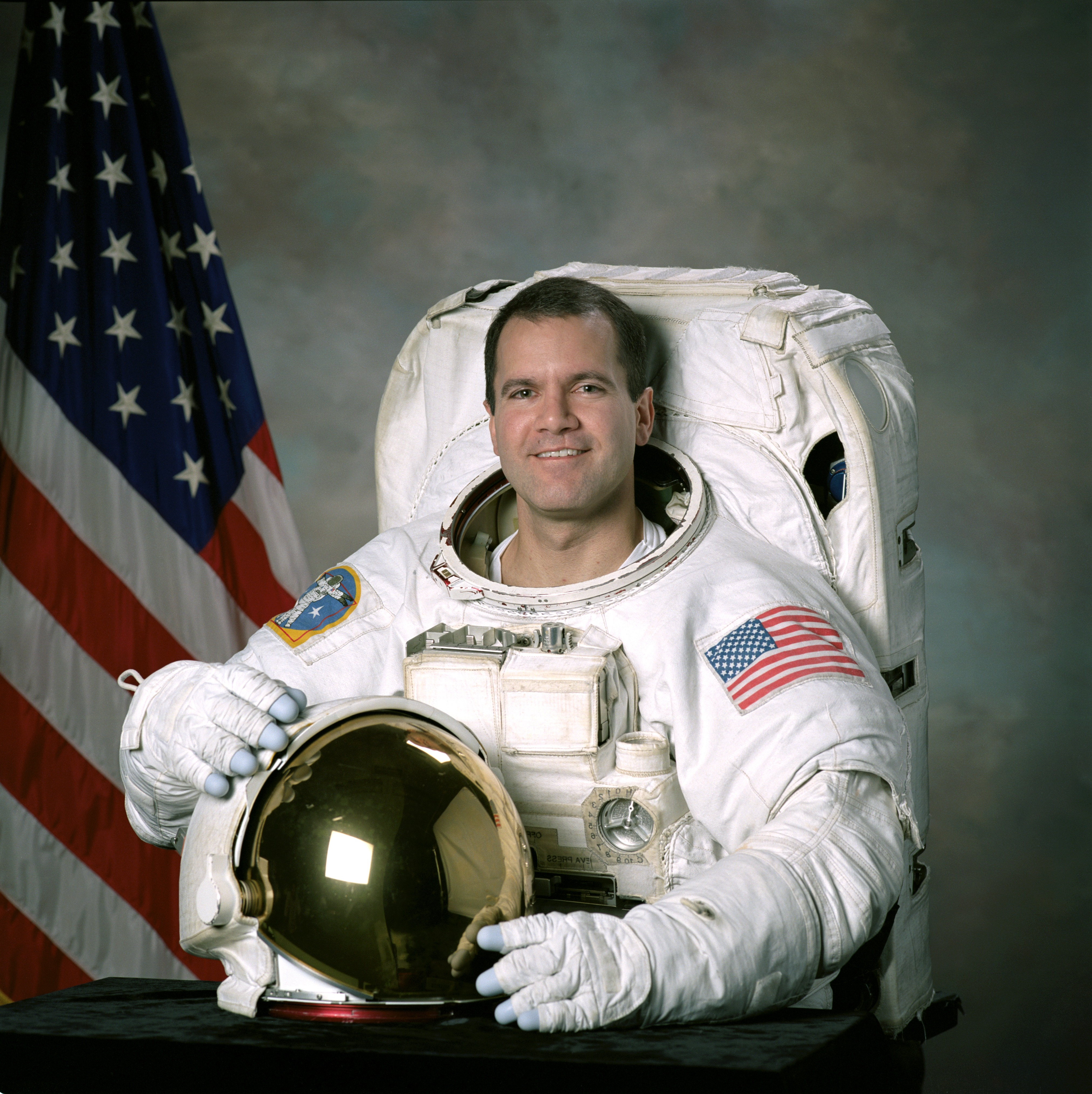 portrait astronaut Paul Richards